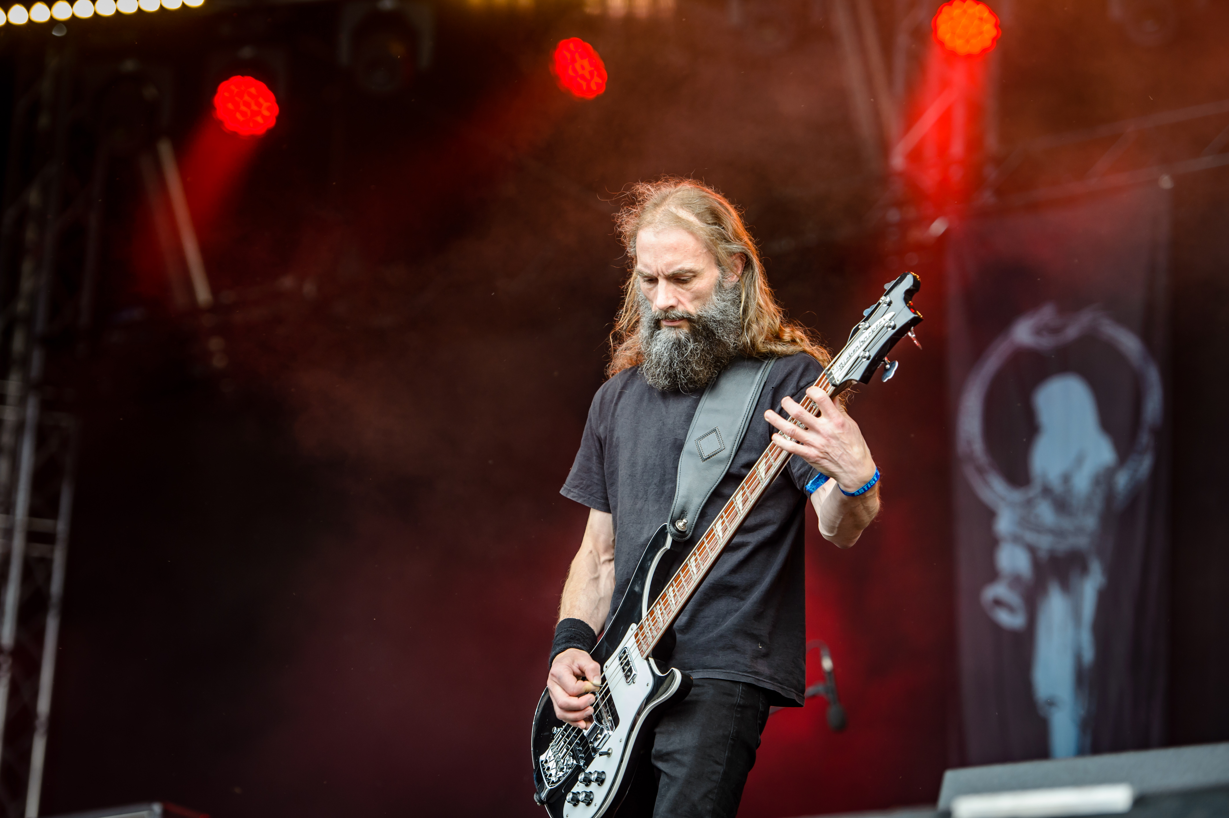 'RockHarz Open Air 2016; Ballenstedt': 'Primordial'